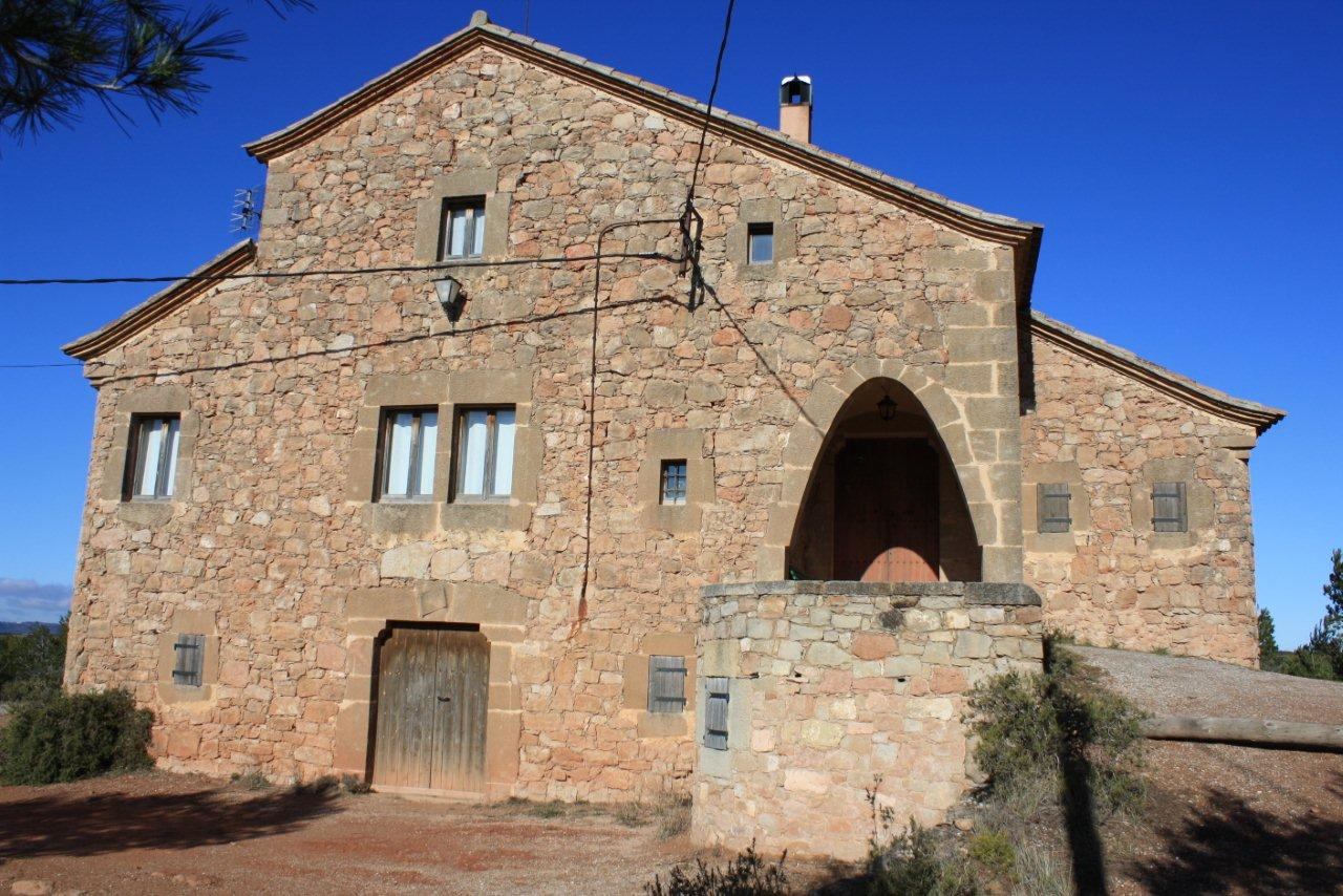 Casa Berenguer, Rubió, Catalunya.